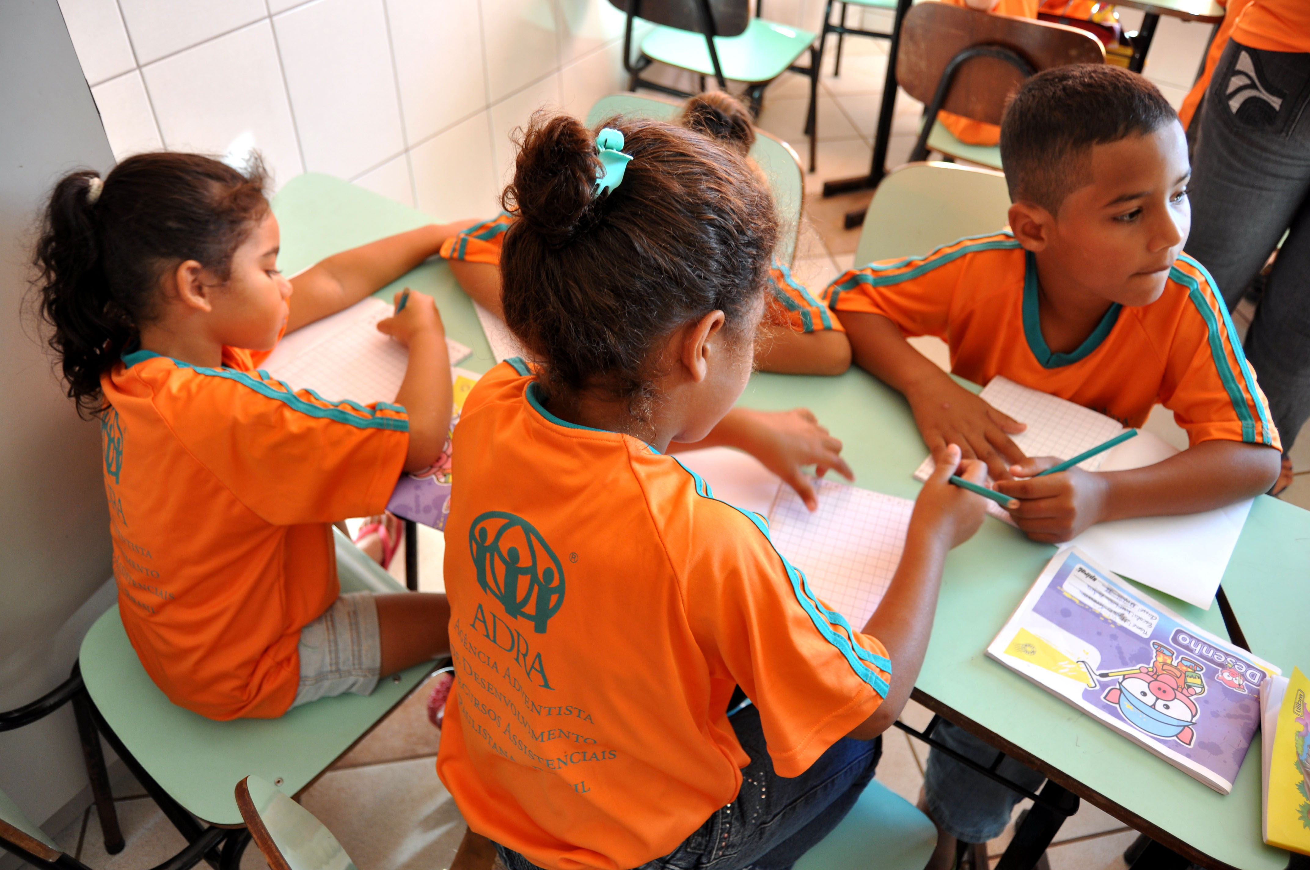 Crianças atendidas na escola do centro ADRA em Itanhaém